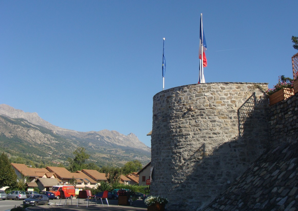 La tour, seul reste de l'ancien château-fort de la Bâtie-Neuve (Hautes-Alpes).